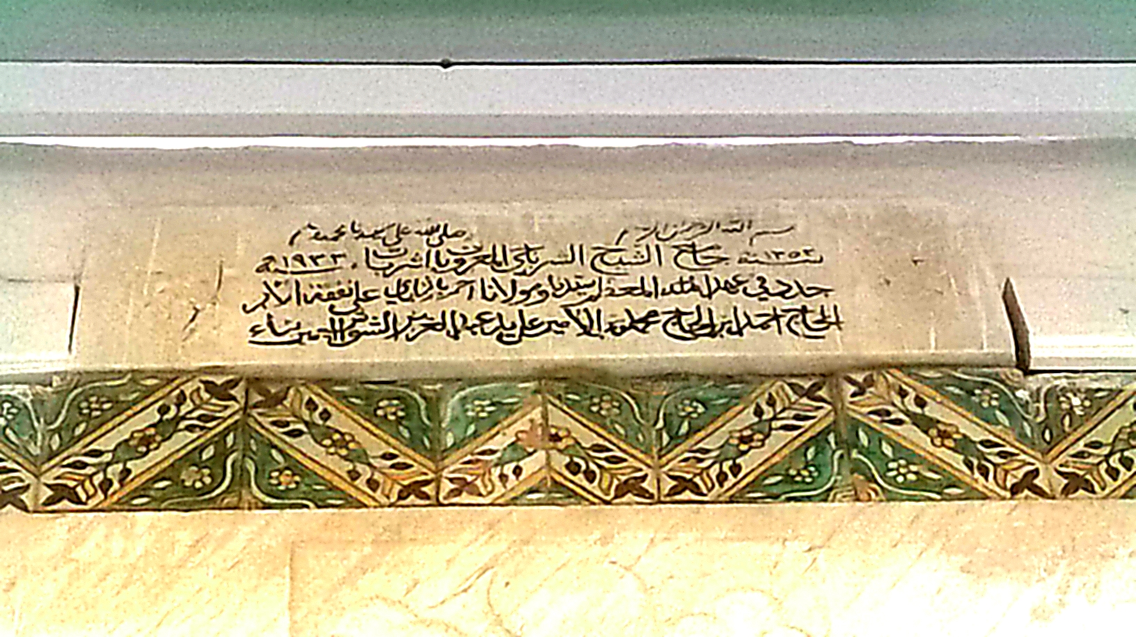 Sidi El Béchir , Tunis سيدي البشير ، تونس